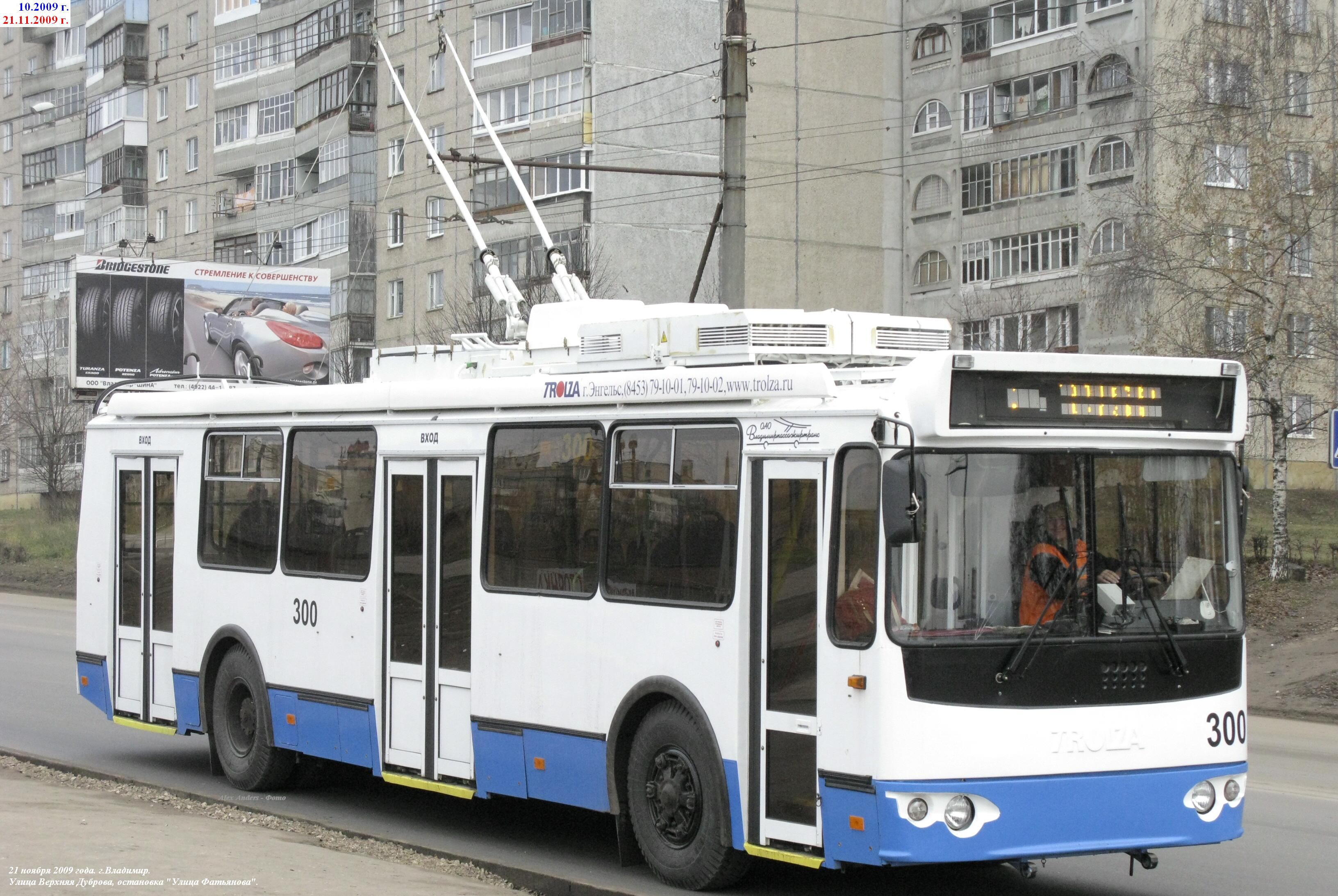 Trolleybus Trolza in Vladimir, Russia